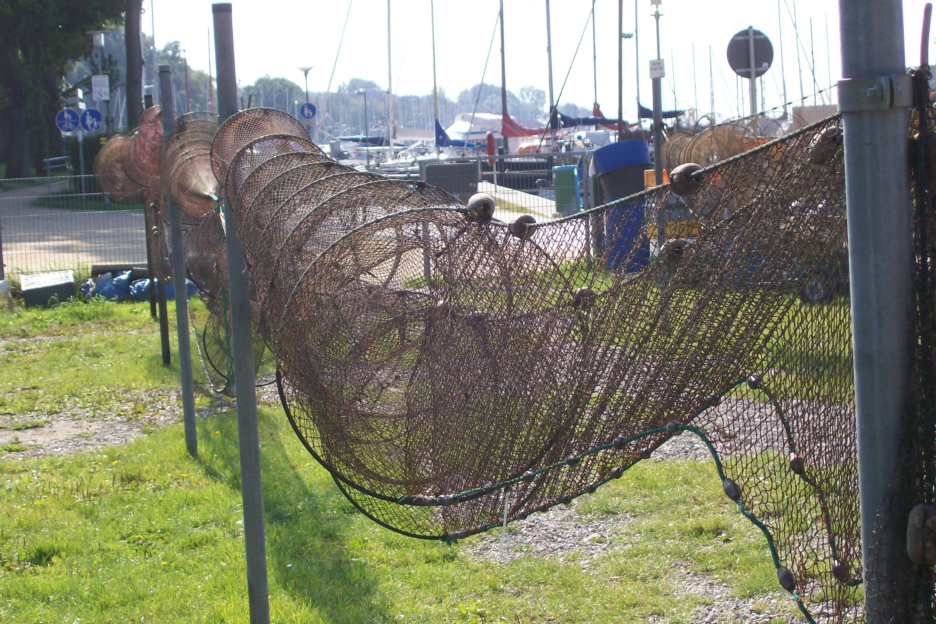 Fischereimuseum in Neustadt in Holstein, Fischreusen auf dem gelände des Fischeramts von 1474 am Neustädter Hafen